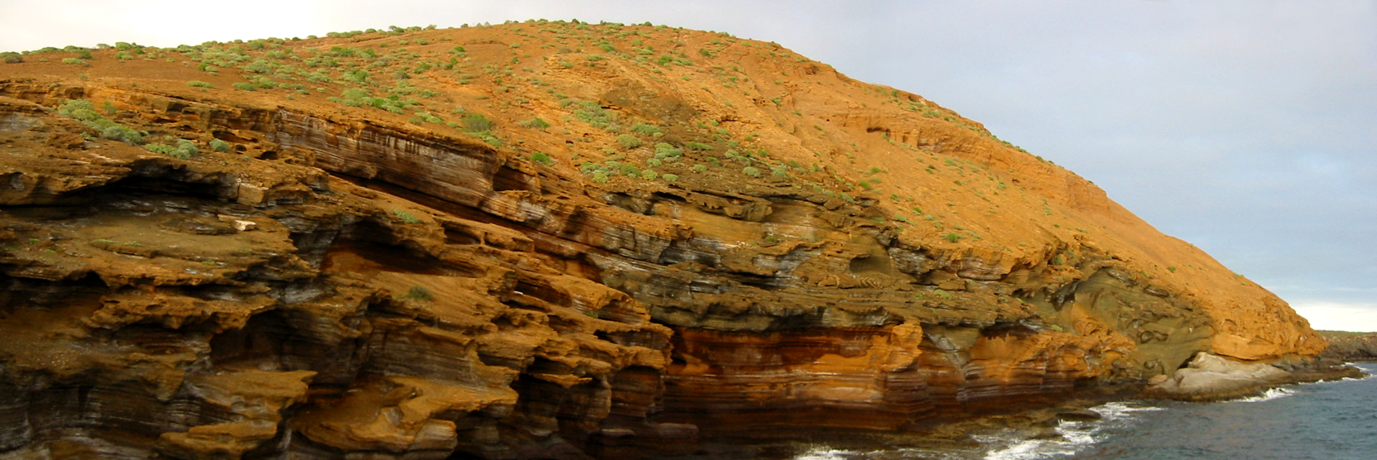 Montaña Amarilla (Tenerife, España)